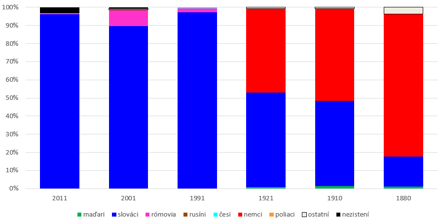 etnické a jazykové zloženie